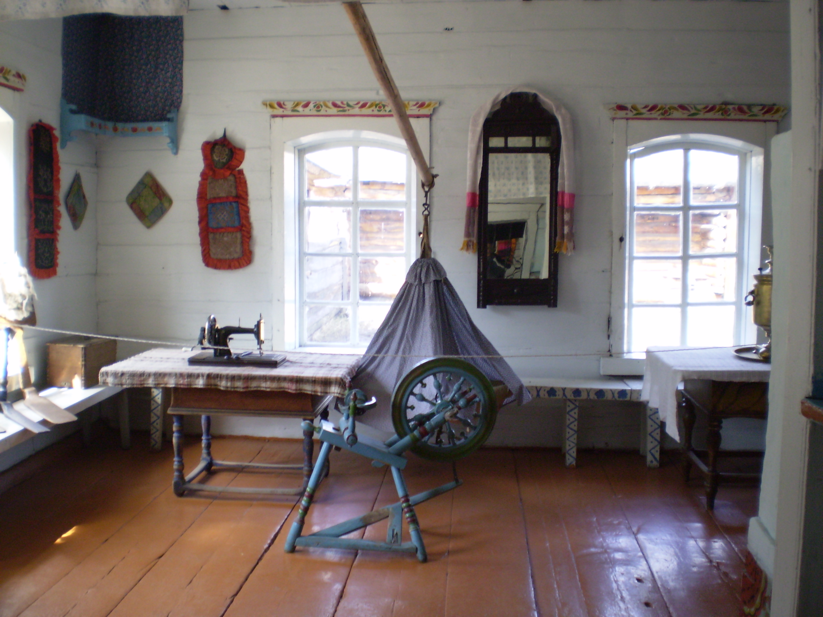 Интерьер старообрядческого дома. Колыбель.